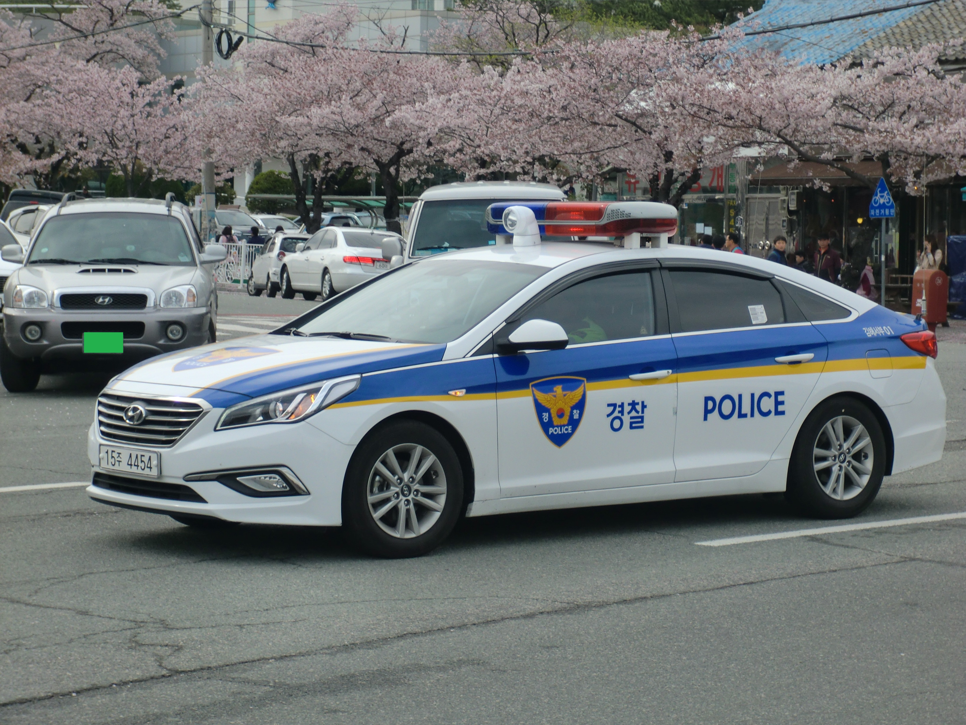 김해서부경찰서의 경찰차